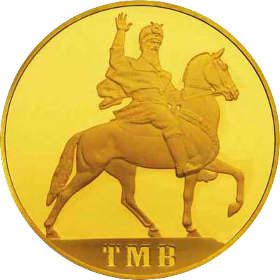 Памятная монета Туркменистана